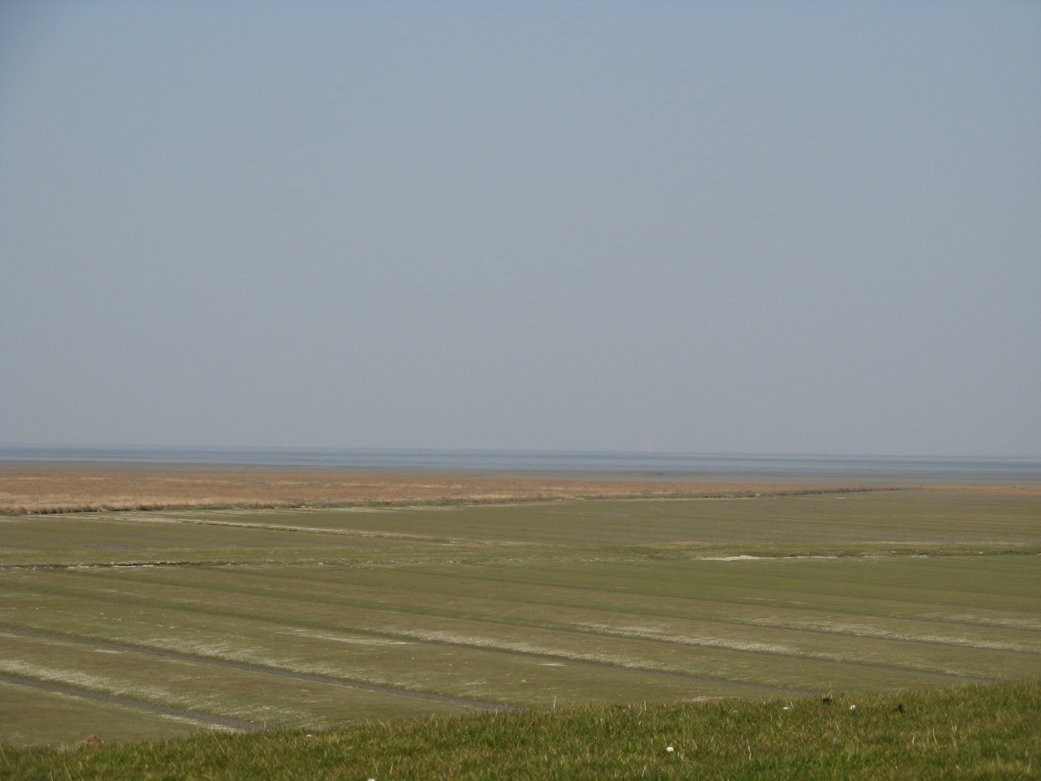 Deichvorland in Auguste-Viktoria-Koog